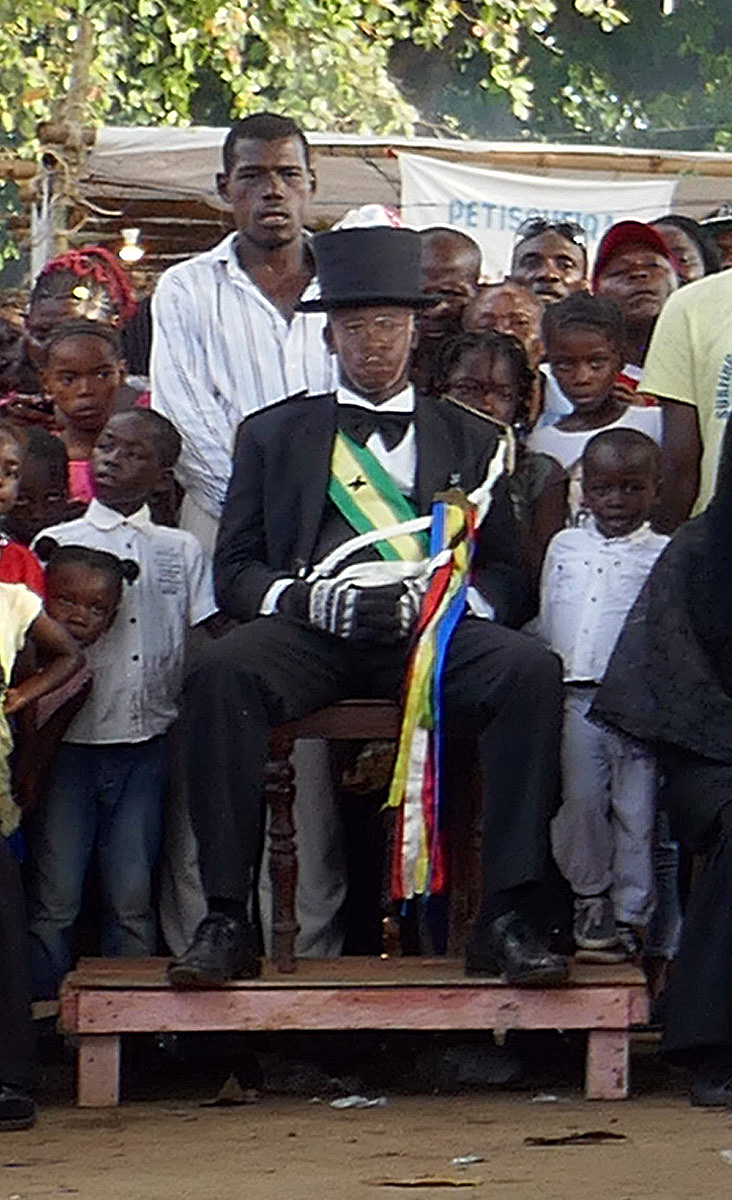 Tchiloli représenté devant la chapelle São Pedrão de São Tomé à l'occasion de la fête patronale. Le marquis de Mantoue.